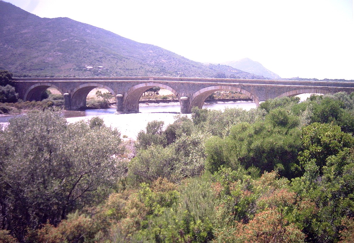 Le pont de la D 81 sur le fleuve Fango, dit "Pont des cinq arches" (Galéria, Haute-Corse)